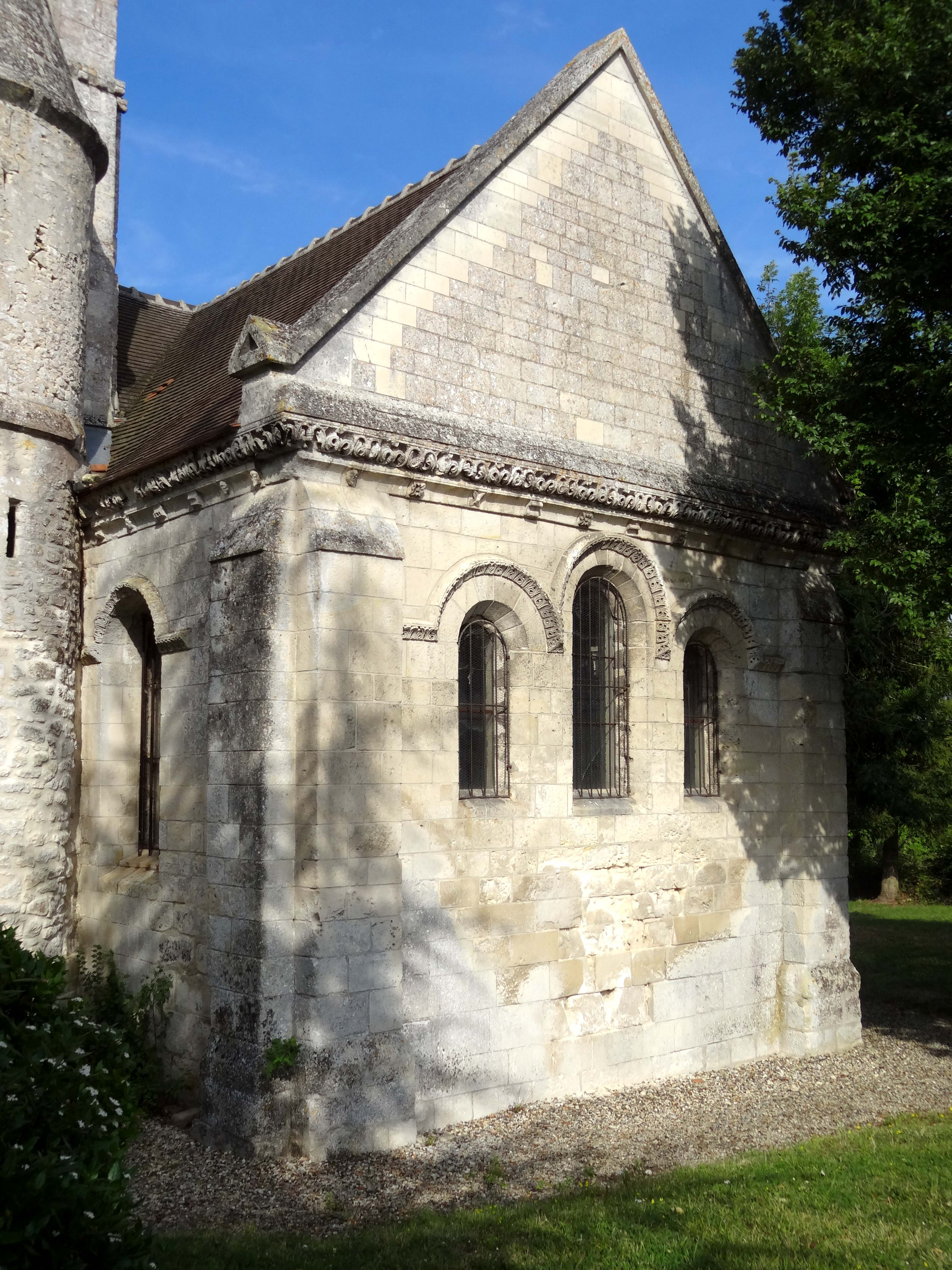 Église Saint-Martin de Noël-Saint-Martin - voir titre.